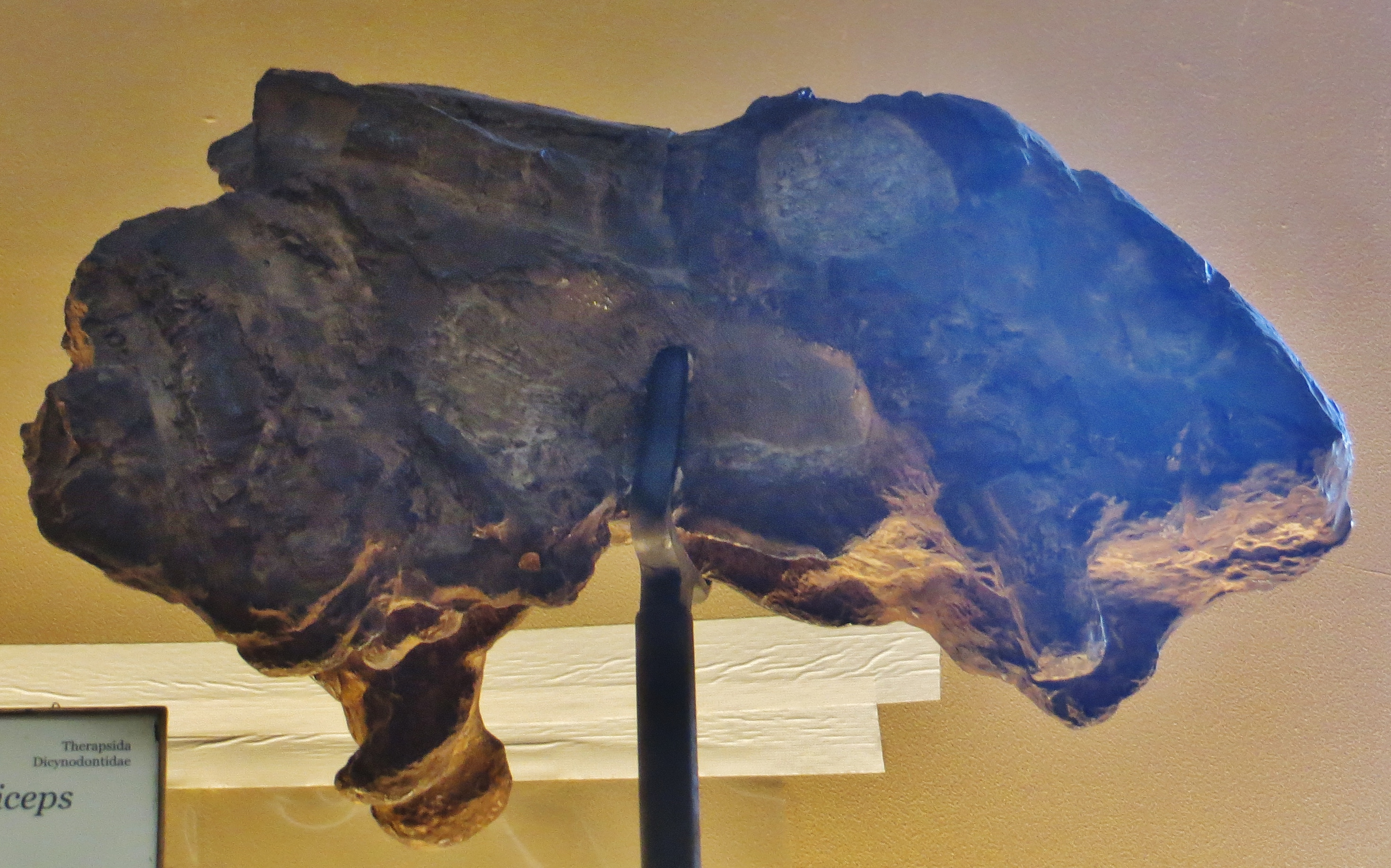 Daptocephalus fossil skull